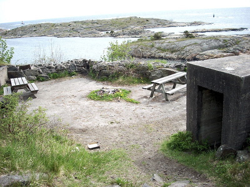 Kanonstilling på Kalvøysund festning